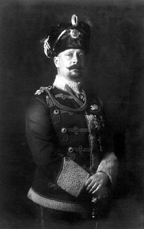 Herzog Johann Albrecht in Uniforn des Preußisches Leib-Garde-Husaren-Regiment